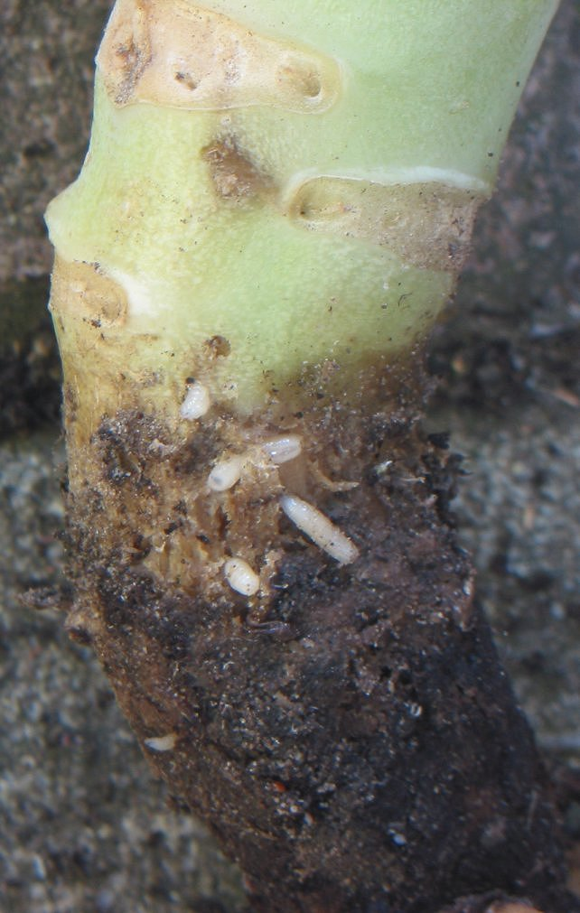 zelfgemaakte afbeelding van koolvlieg aantasting op bloemkool; eind mei